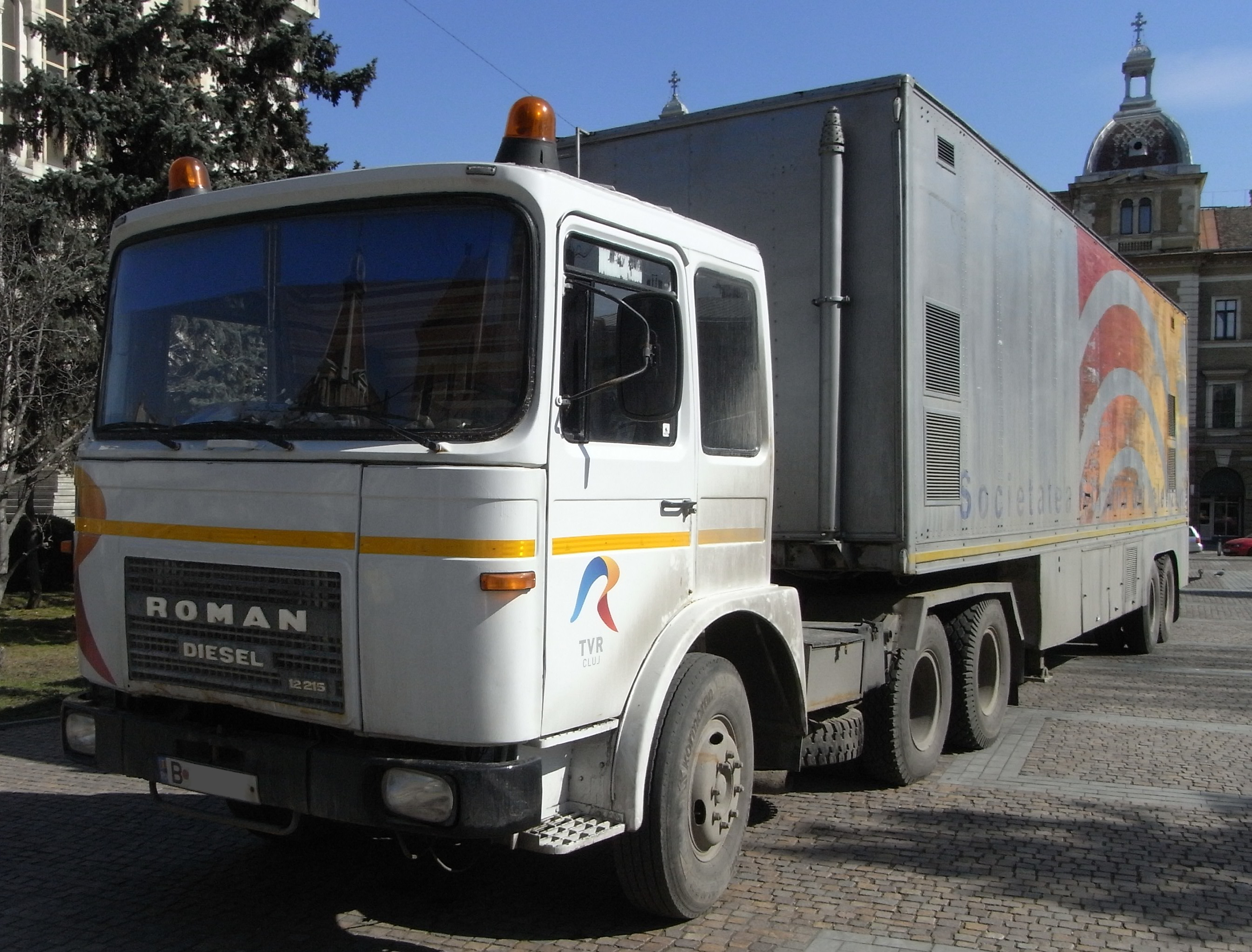 Roman-kamiono de la Rumana Televido